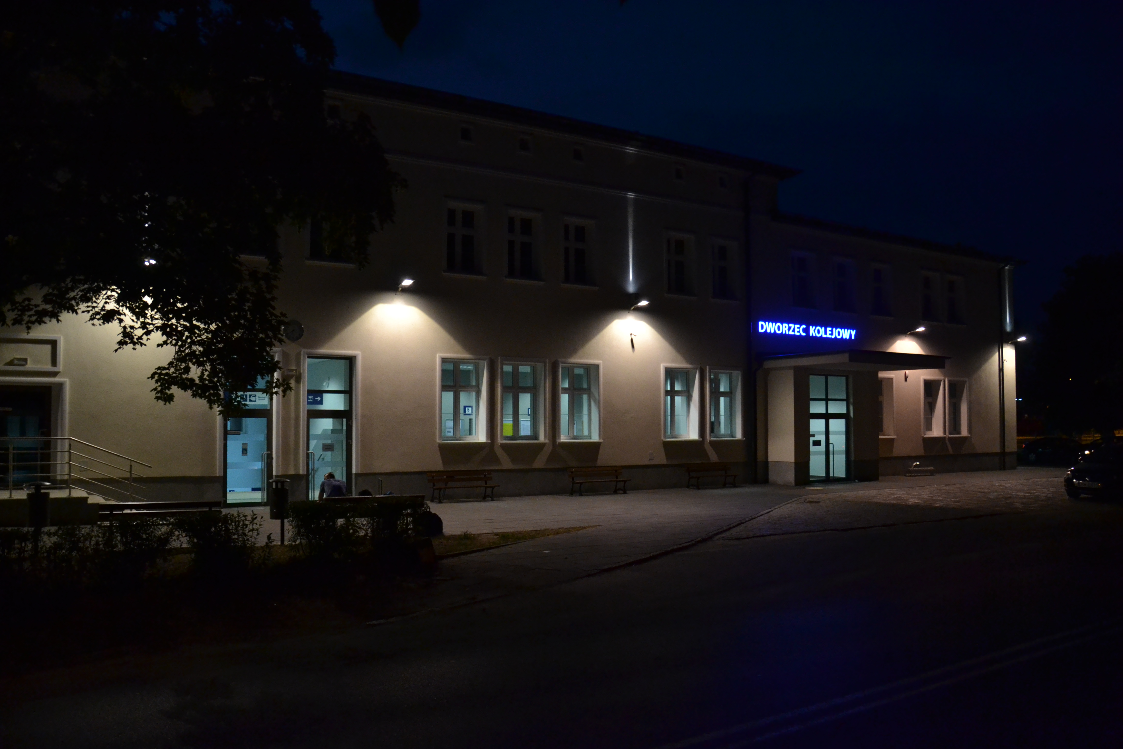 Widok dworca w Jaworzynie Ślaskiej od strony miasta This photo was taken during Railway Wikiexpedition 2015 set up by Wikimedia Polska Association in cooperation with Fundacja Grupy PKP. You can see all photographs in category Wikiekspedycja kolejowa 2015.